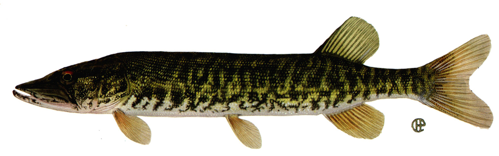 Grass Pickerel (Esox americanus vermiculatus)